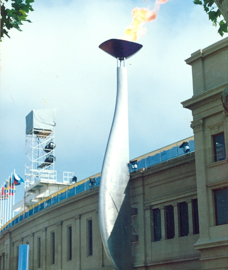 Barcelona AUGUST 1992 the Olympic Games (Juegos Olímpicos de Barcelona 1992)